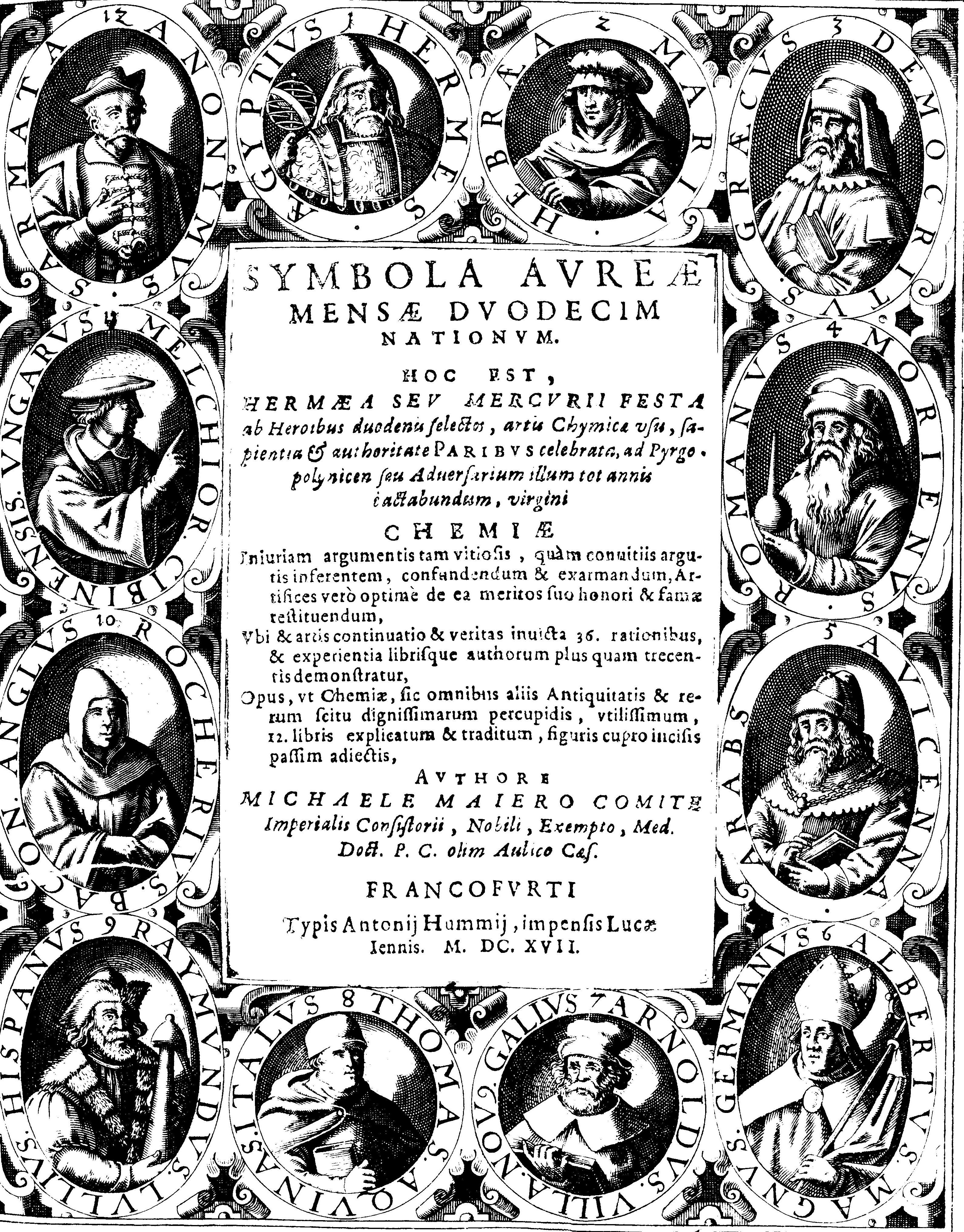 Titelblatt der Schrift: Michael Maier. Symbola Aureae Mensae duodecim Nationum. Frankfurt 1617. 12 Alchemisten an einer goldenen Tafel.